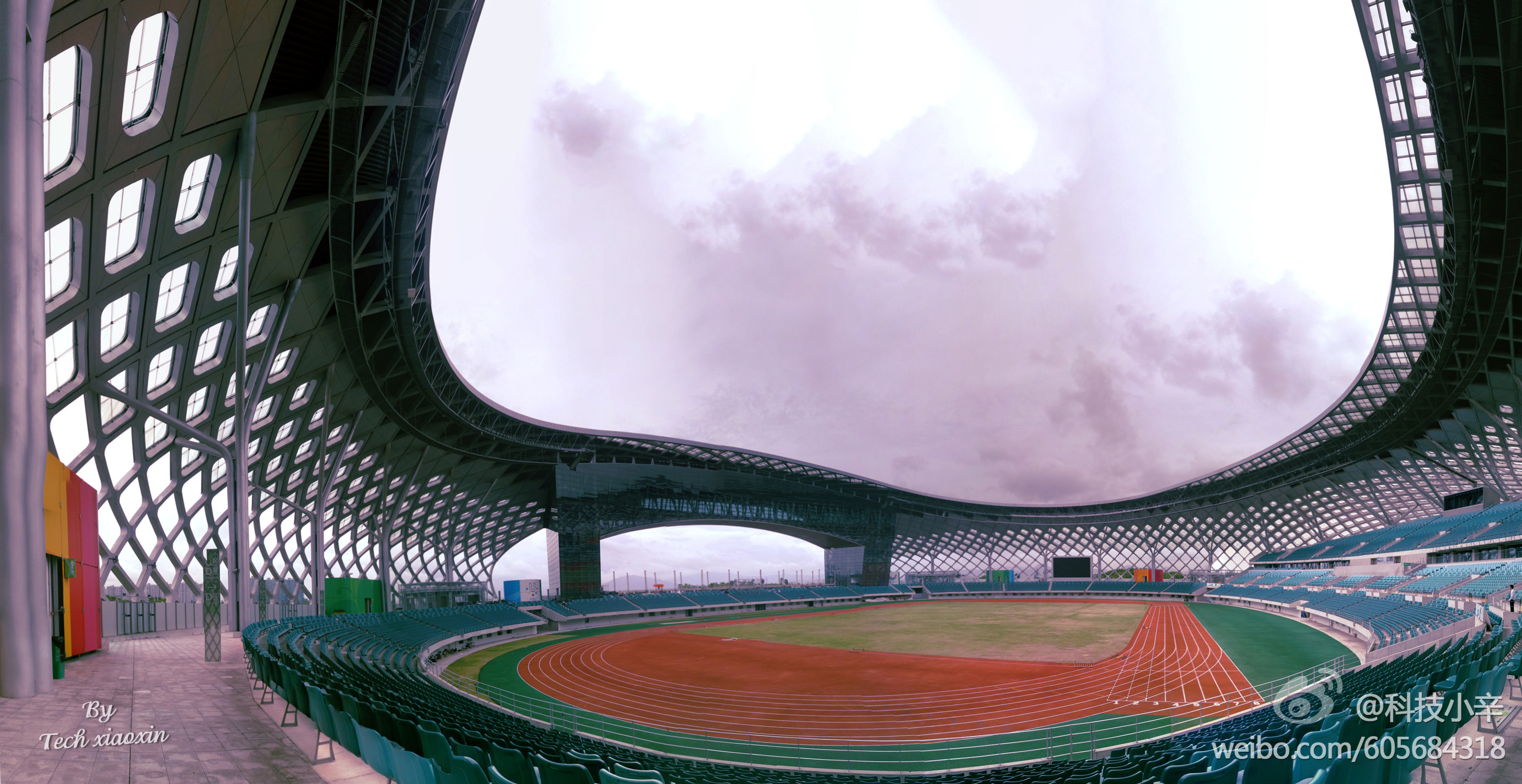 深圳湾体育馆 体育场地内全景图 --- By 科技小辛